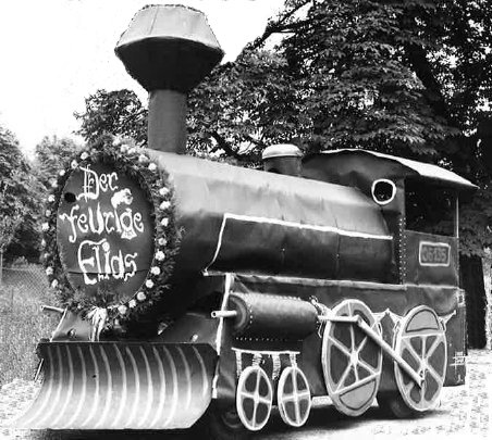 Festumzug in Bad Ischl am 26. Juni 1966, 500 Jahre Markterhebung, Modell der Lokomotive als Aufbau auf einem Auto, als Erinnerung an die Salzkammergut-Lokalbahn und an die Operette "Der feurige Elias", Foto von H. Demel in Bad Ischl.